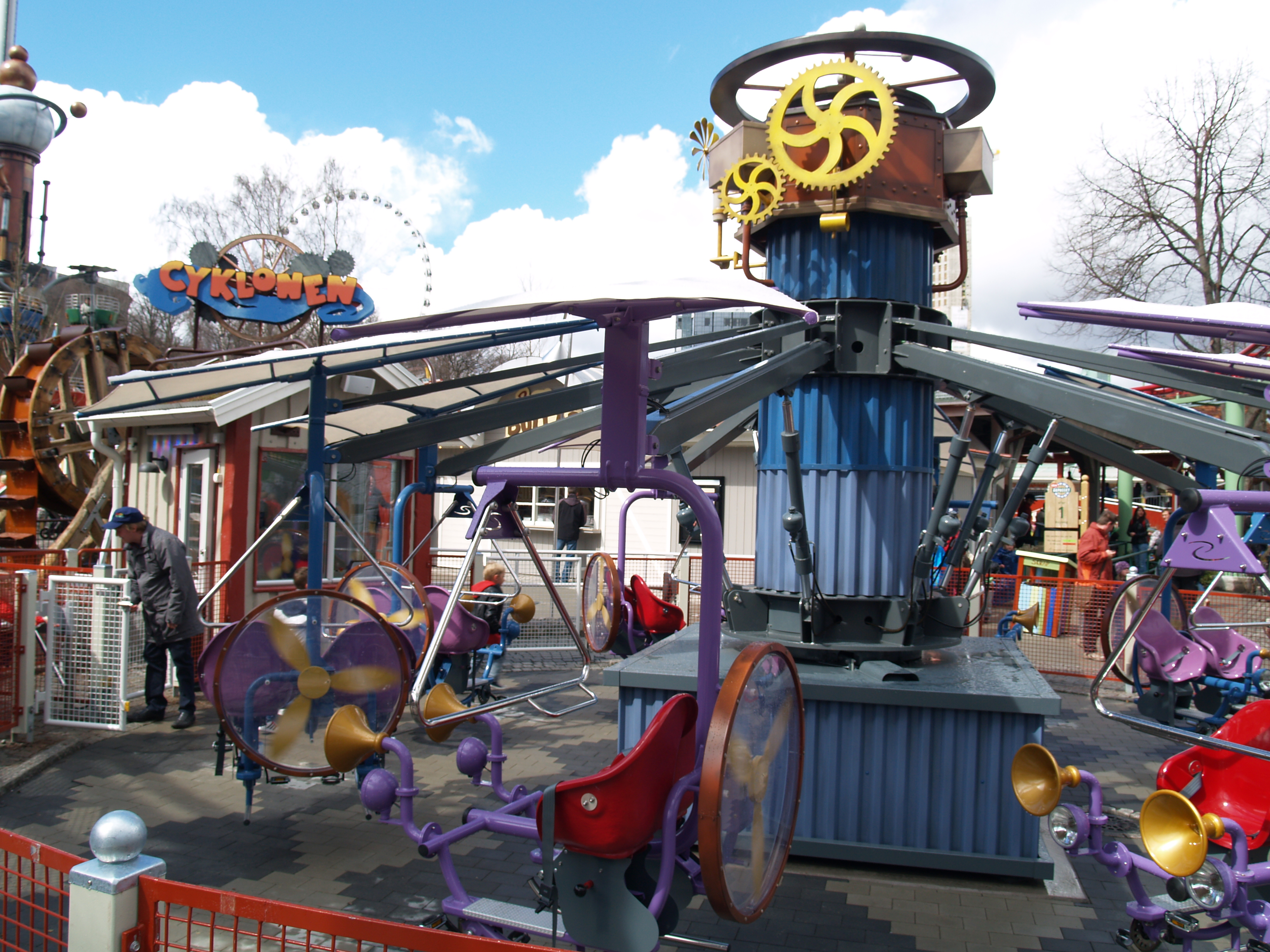 Attraktionen Cyklonen i nöjesparken Liseberg. Här fotograferad på invigningsdagen. I bakgrunden syns Lisebergshjulet, och till höger skymtar Högspänningen.